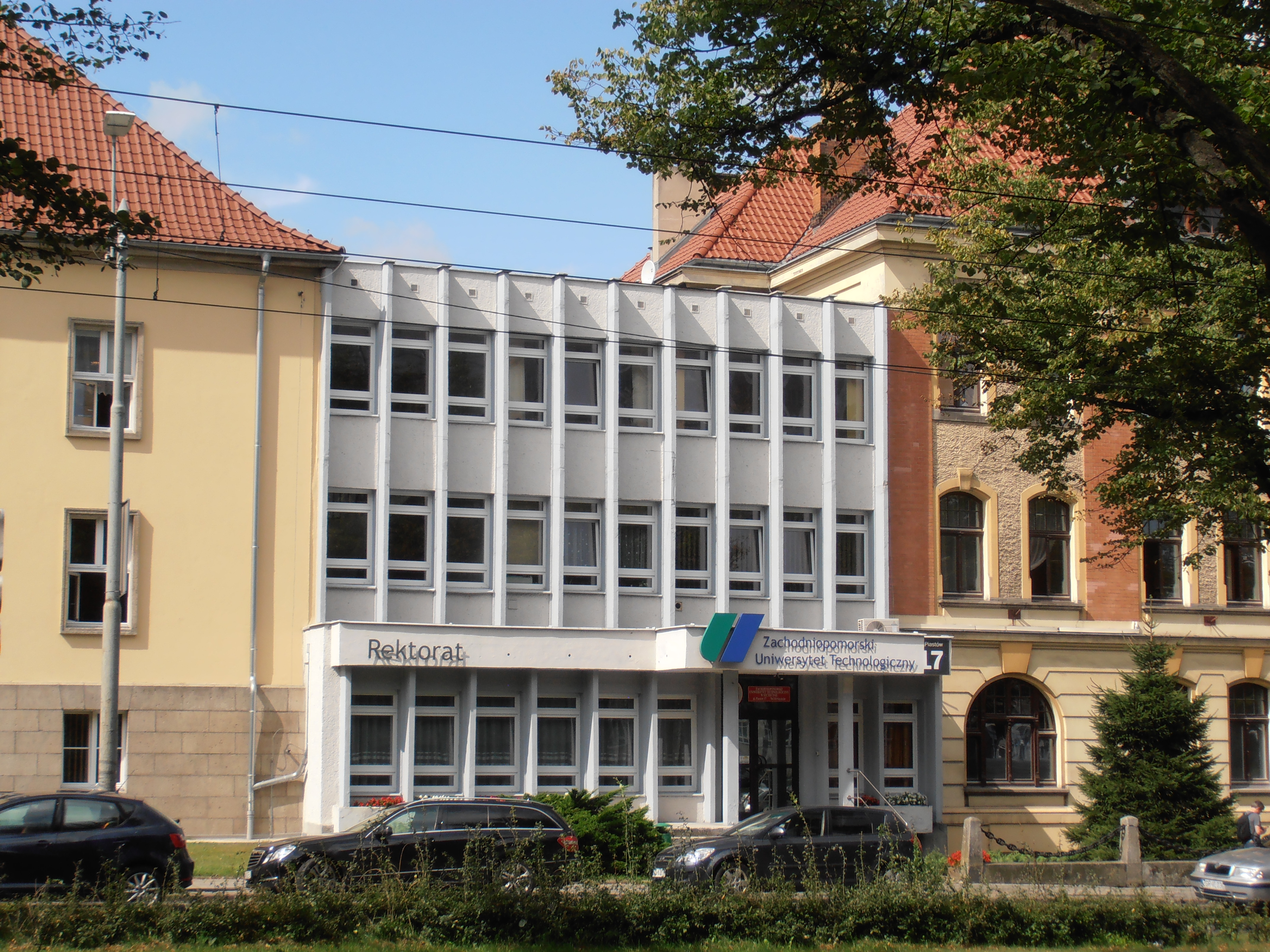 Rektorat ZUT, 2016